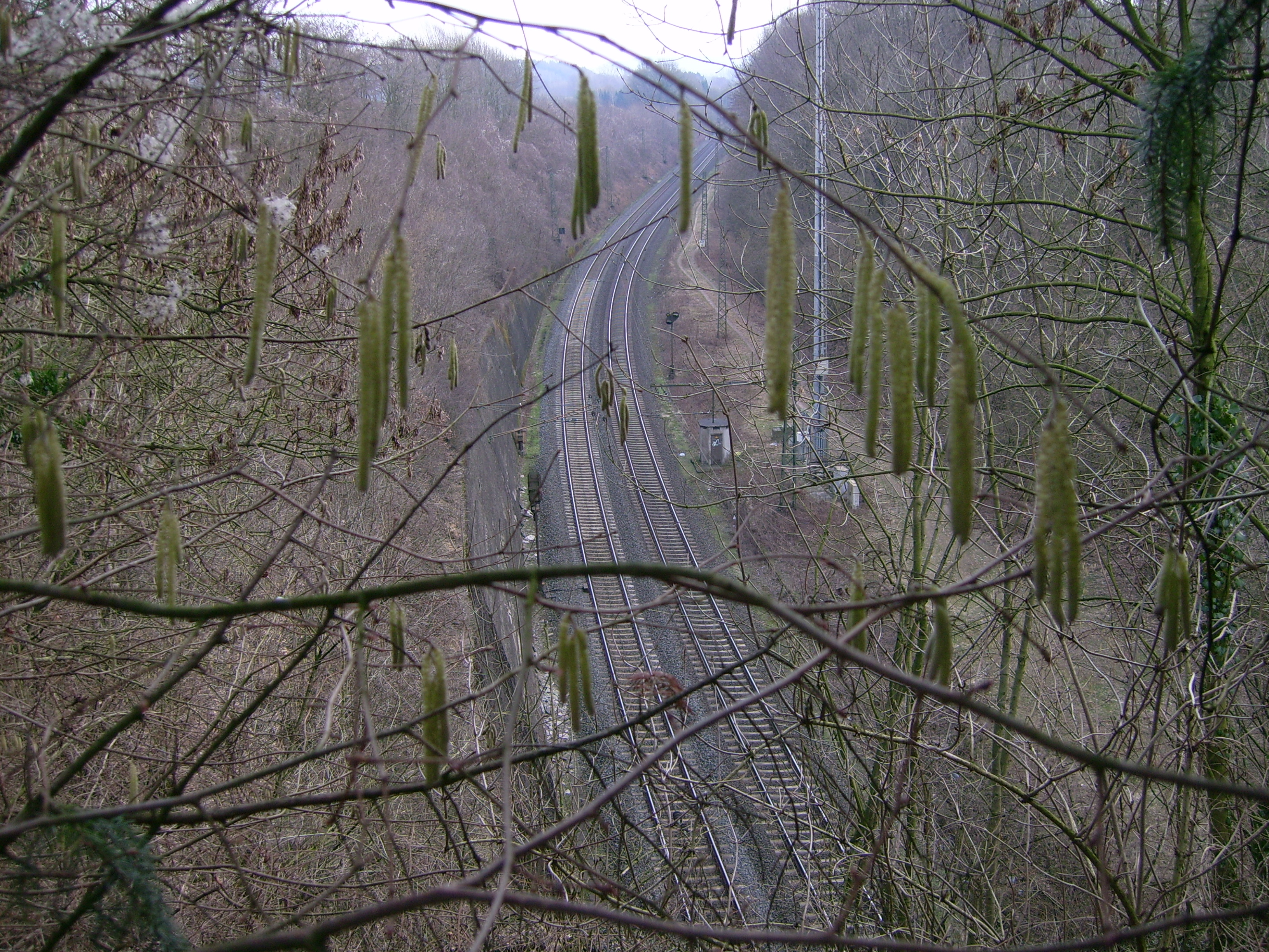 Blick von der Straße oberhalb des Lengericher Tunnel nach Nordosten